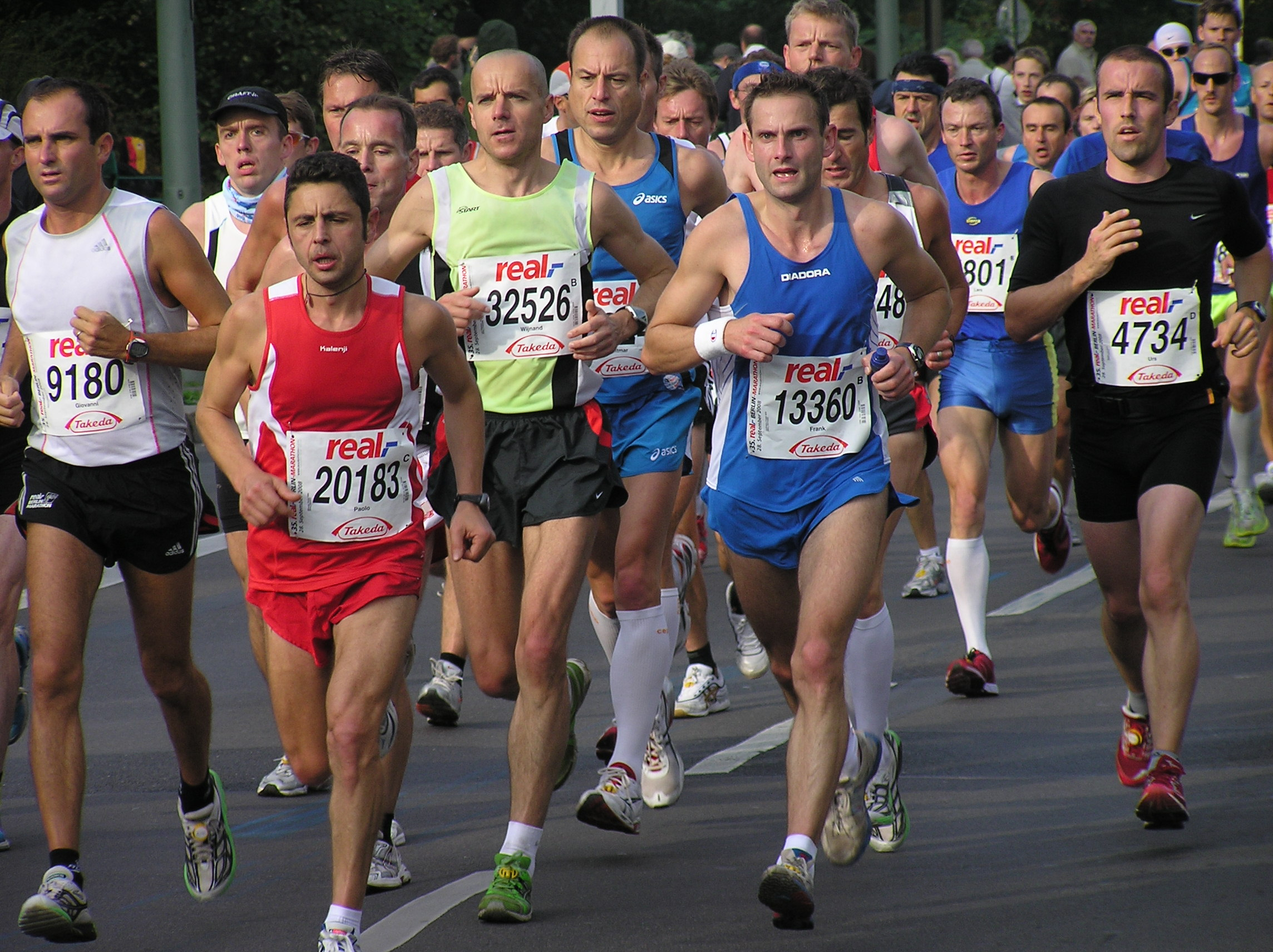 Berlin-Marathon 2008 - Auf der Strecke